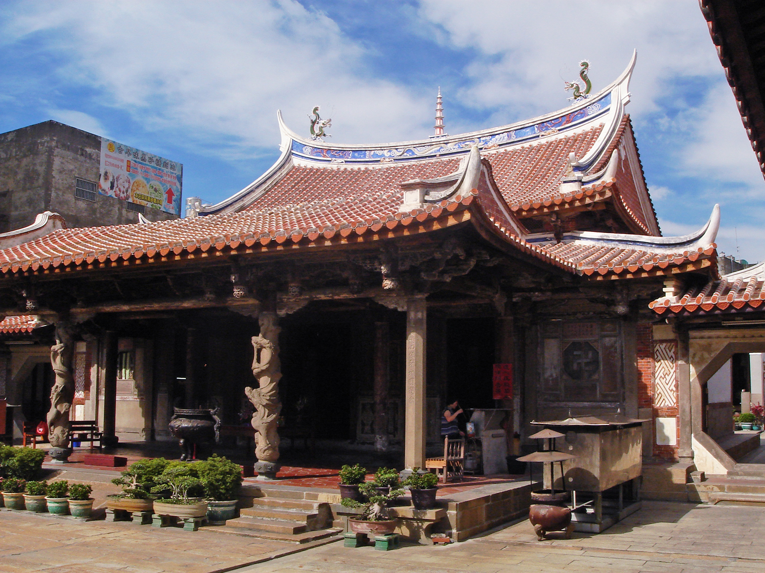 鹿港龍山寺拜殿